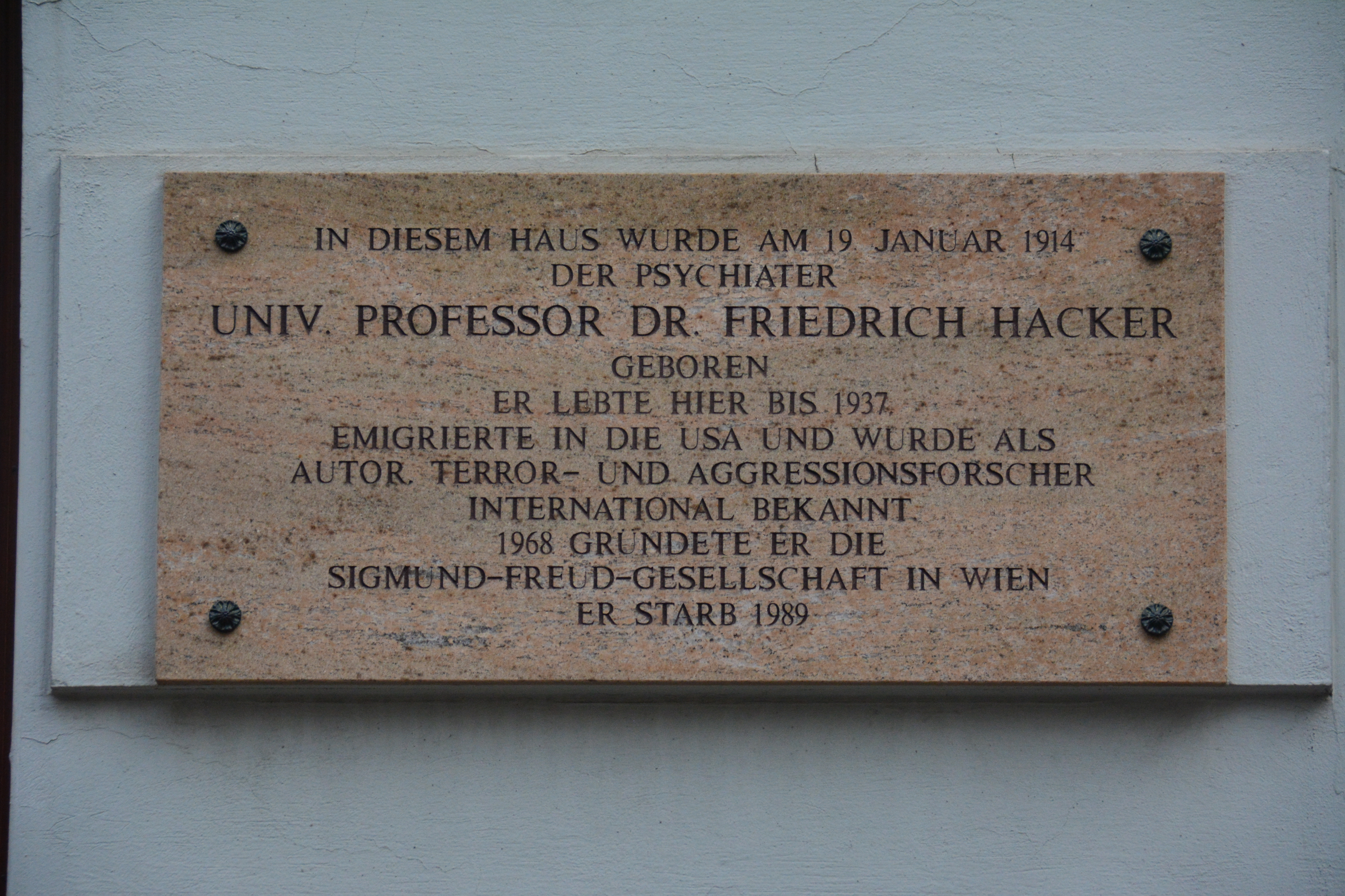 Gedenktafel für Friedrich Hacker (Wien, Hegelgasse 21)